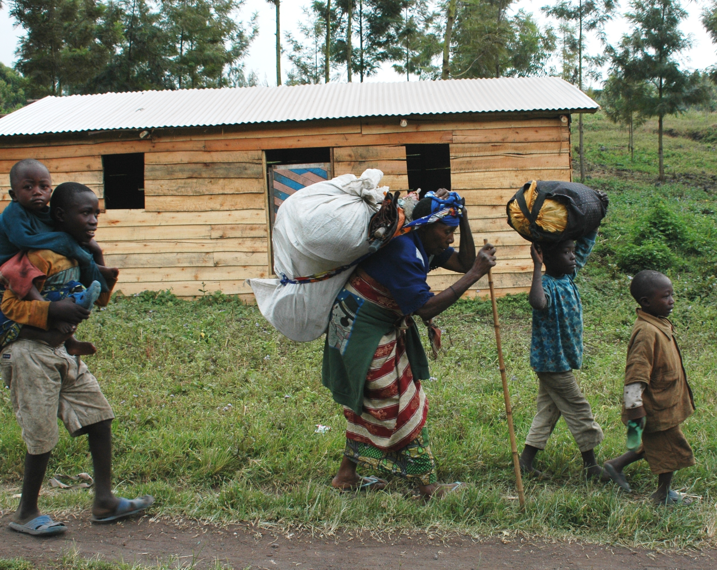 Les populations de Mutaho fuient vers Goma après un deuxième jour (21 mai 2013) d'accrochages entre des éléments du M23 et les soldats FARDC. La MONUSCO renforce sa présence dans la zone. © MONUSCO/Clara Padovan